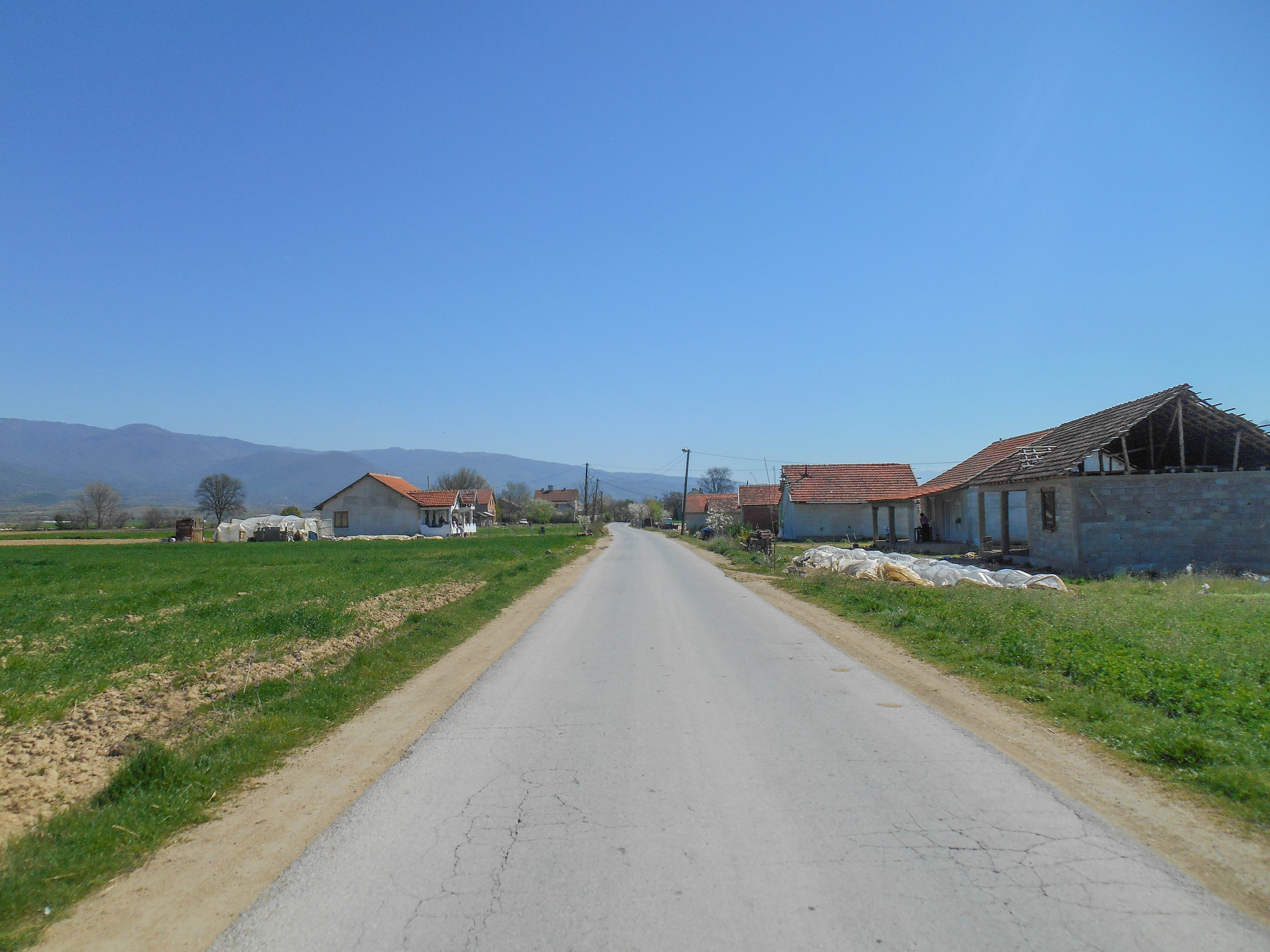 Старо Балдовци